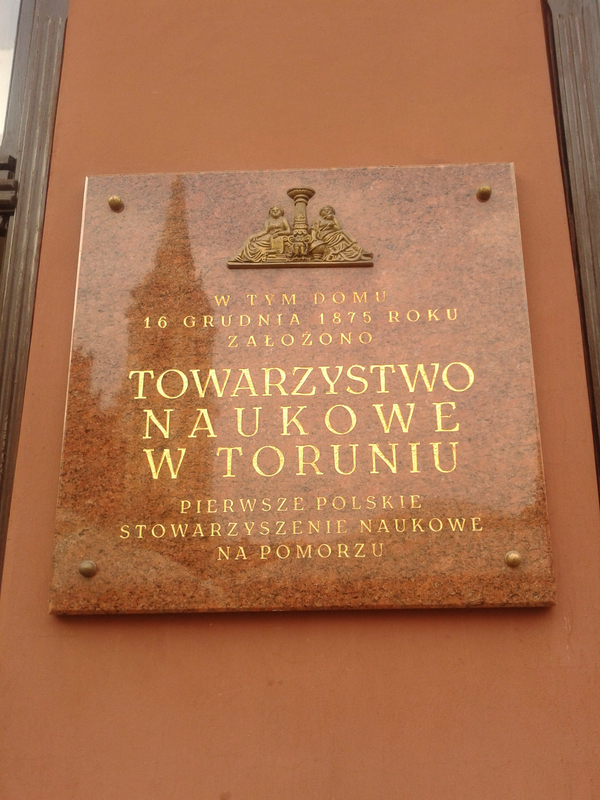 Hotel "Pod Trzema Koronami" w Toruniu, Rynek Straromiejski 21 przy wejściu do restauracji inskrypcja: w tym domu/ 16 grudnia 1875 roku/ założono/ TOWARZYSTWO/ NAUKOWE/ W TORUNIU/ pierwsze polskie/ stowarzyszenie naukowe/ na Pomorzu